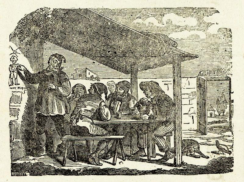 Illustration d'une feuille volante avec trois chansons, une de Charles Durand, les deux autres de Gustave Leroy. Cette gravure a déjà été utilisée par Charles Gille en 1849 pour illustrer sa publication Les grelots de Momus. Références de l'édition de 1859